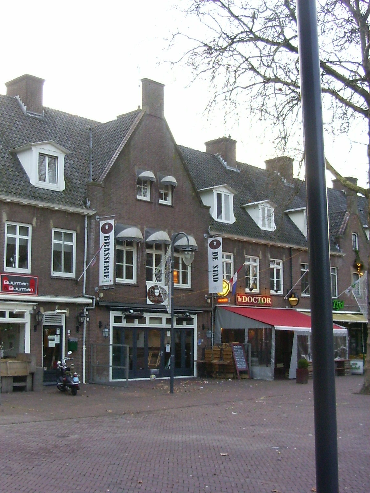 Wageningen, Markt 16, gemeentelijk monument